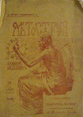 "Летоструй".